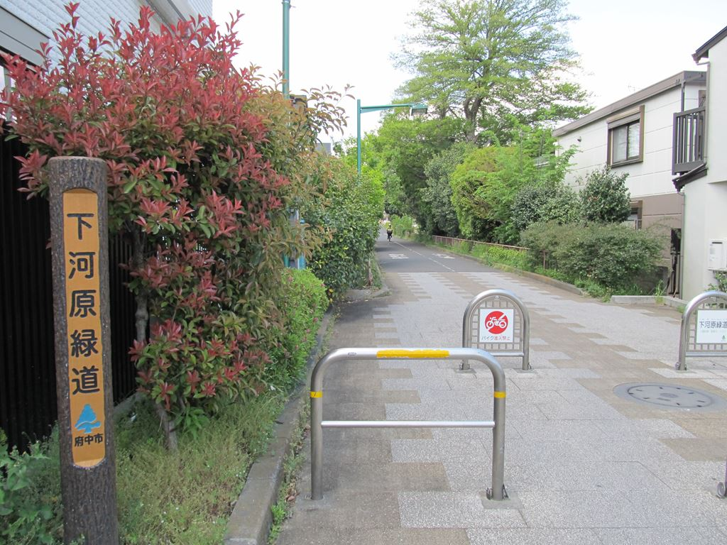 下河原線跡下河原緑道